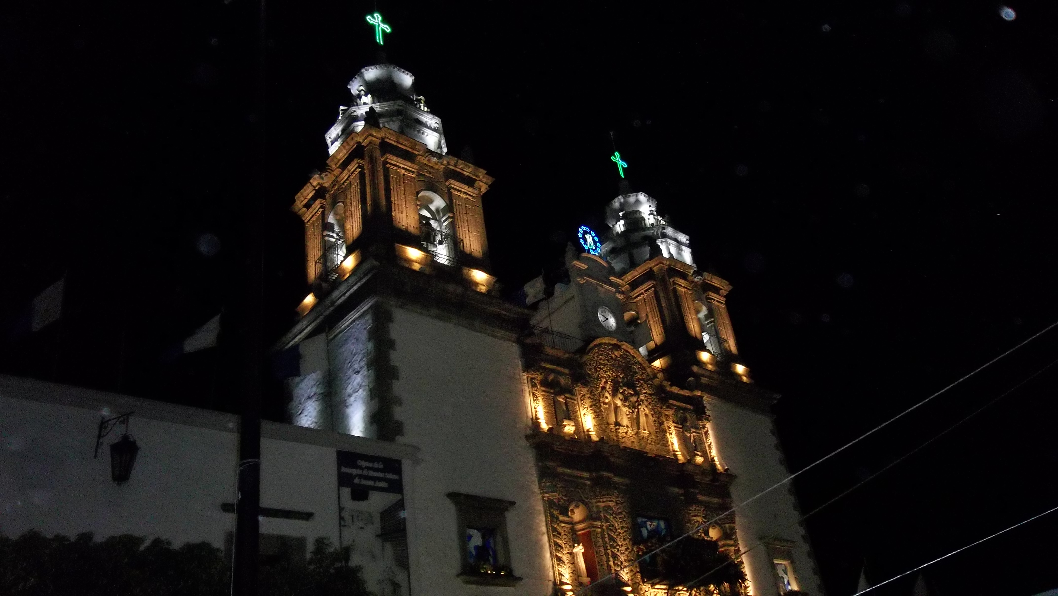 Parroquia franciscana en Santa Anita, Tlaquepaque